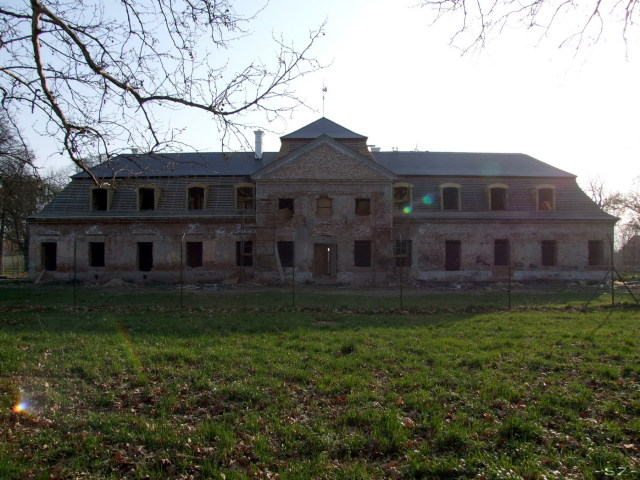 Mándoki Forgách-kastély, Szabolcs-Szatmár-Bereg megye, Magyarország